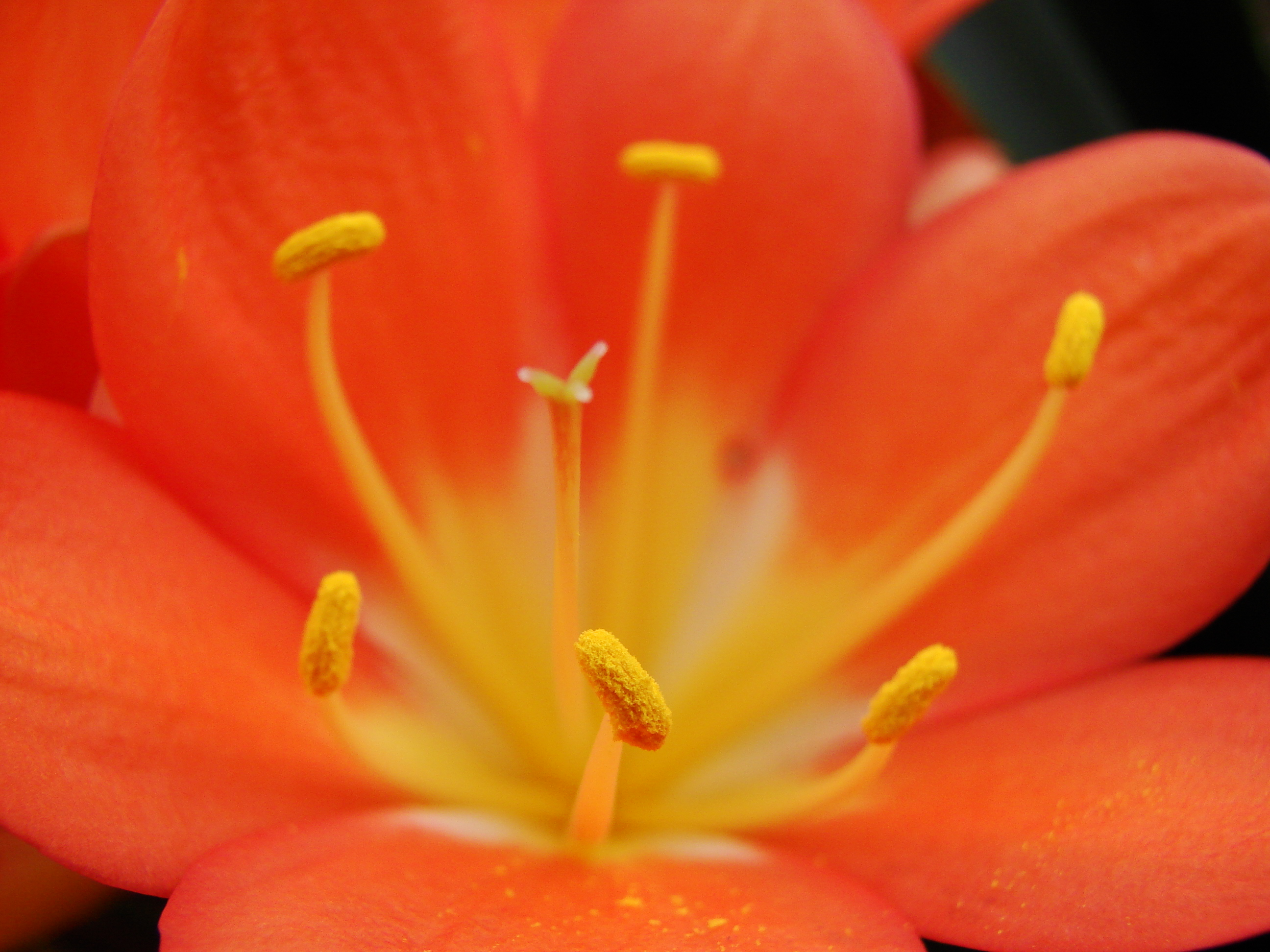 Jardin botanique de l'Université de Zurich (Suisse) : Clivia miniata (Lindl.) Bosse